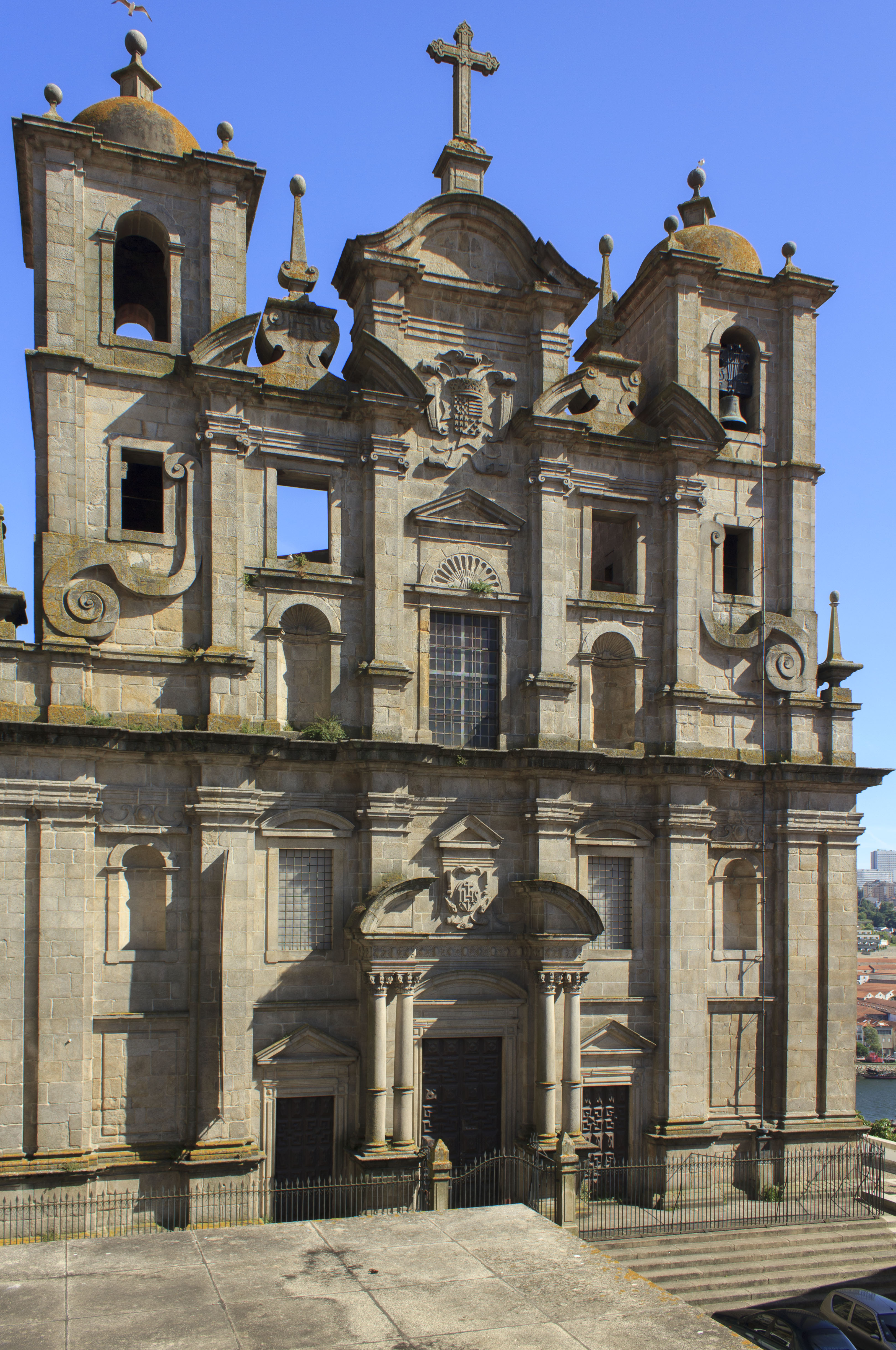 Convento dos Grilos